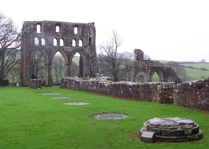 Dundrennan Abbey, Scotland